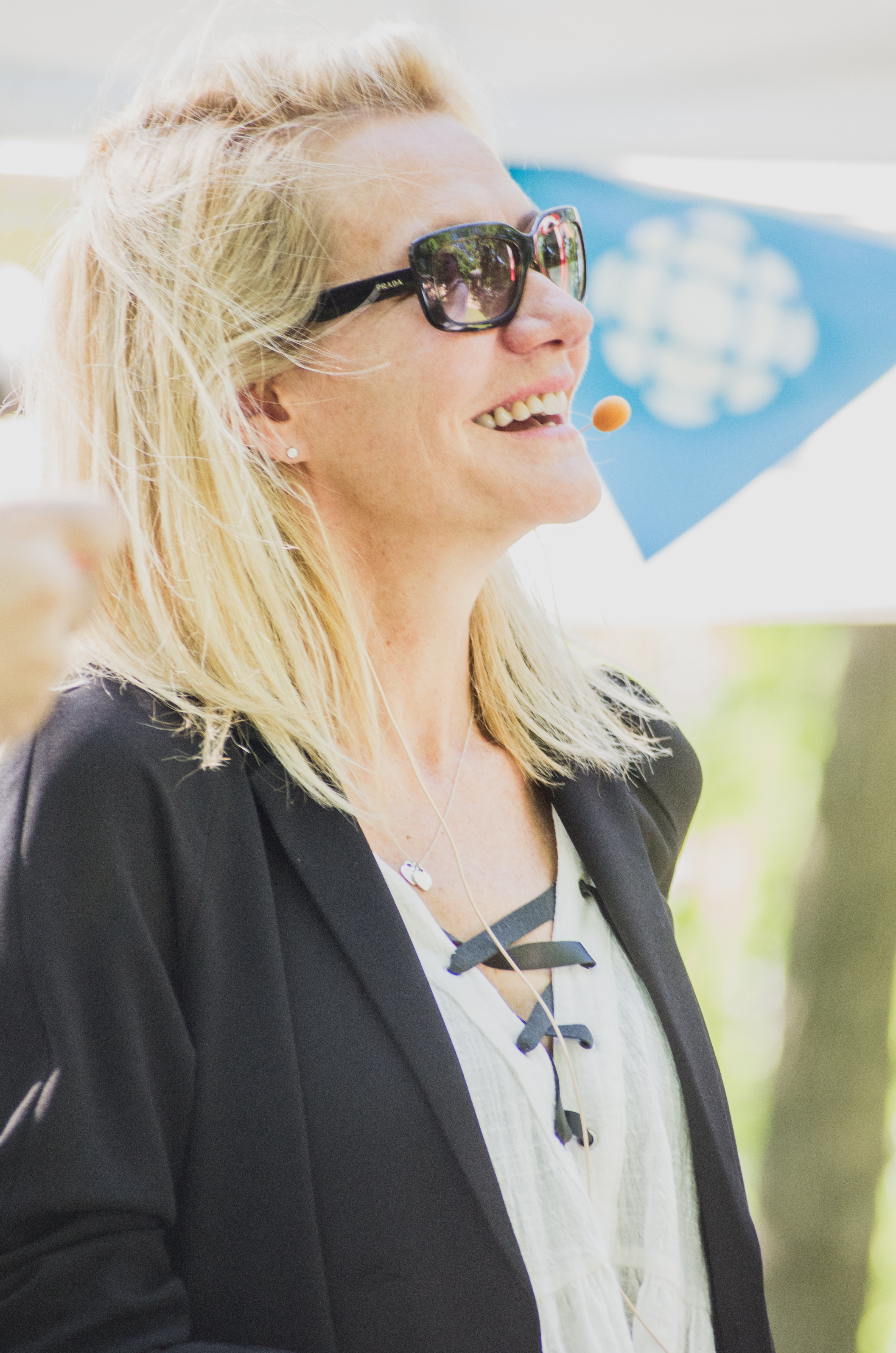 Élise Guilbault en 2016.